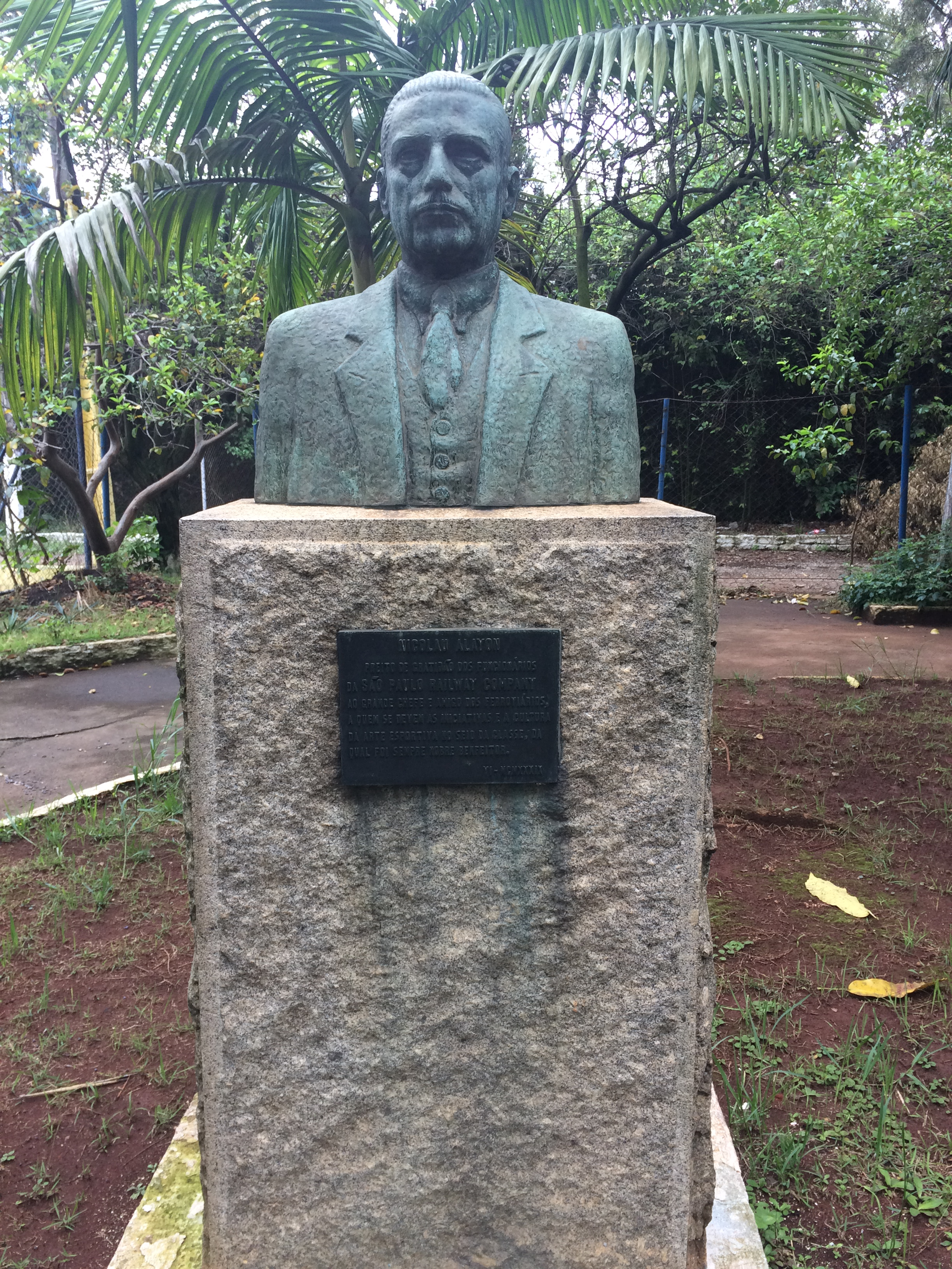 Busto em homenagem ao uruguaio Nicolau Alayon, que dá o nome ao estádio.